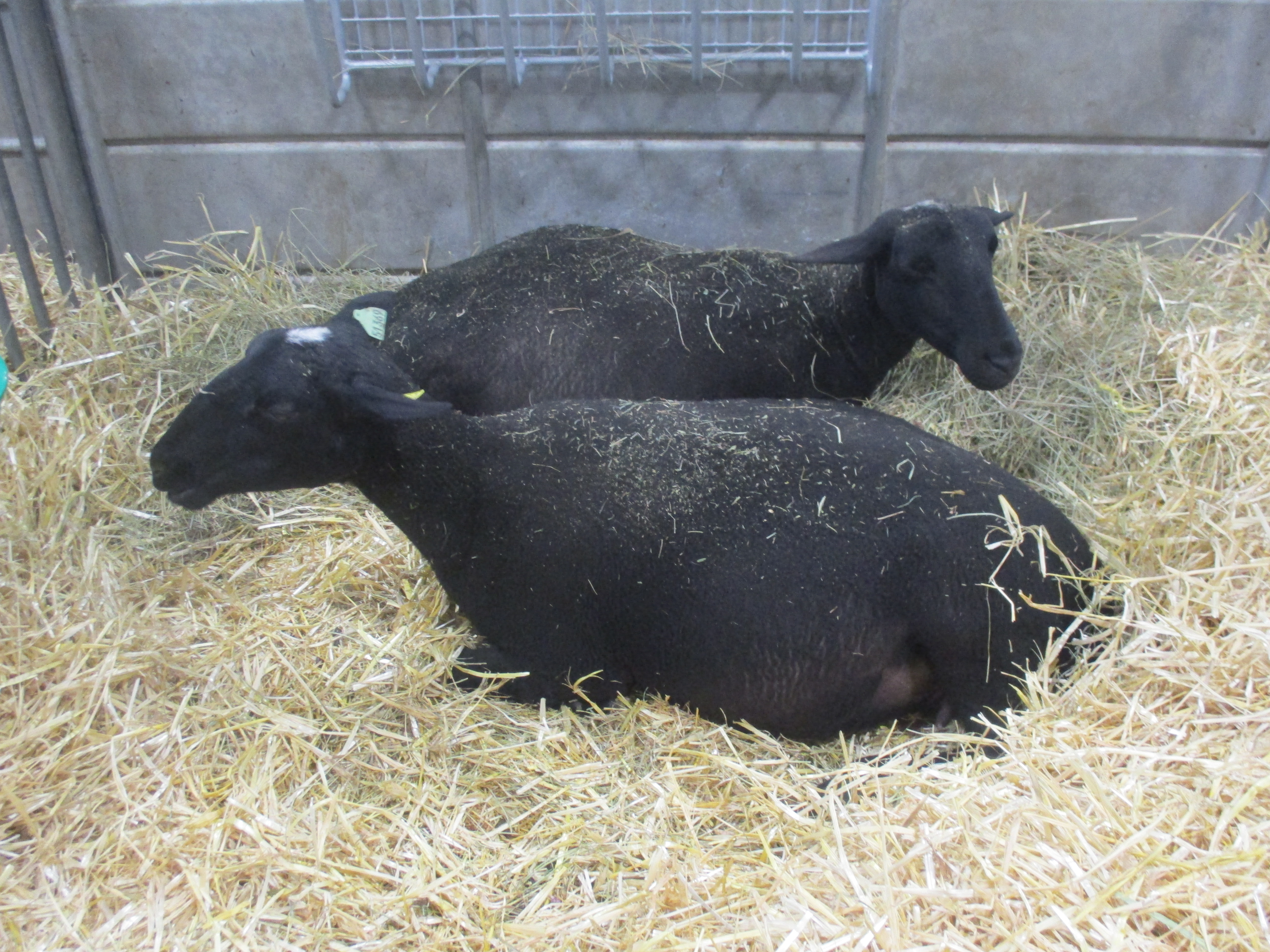 Brebis noires du Velay. Salon de l'agriculture.